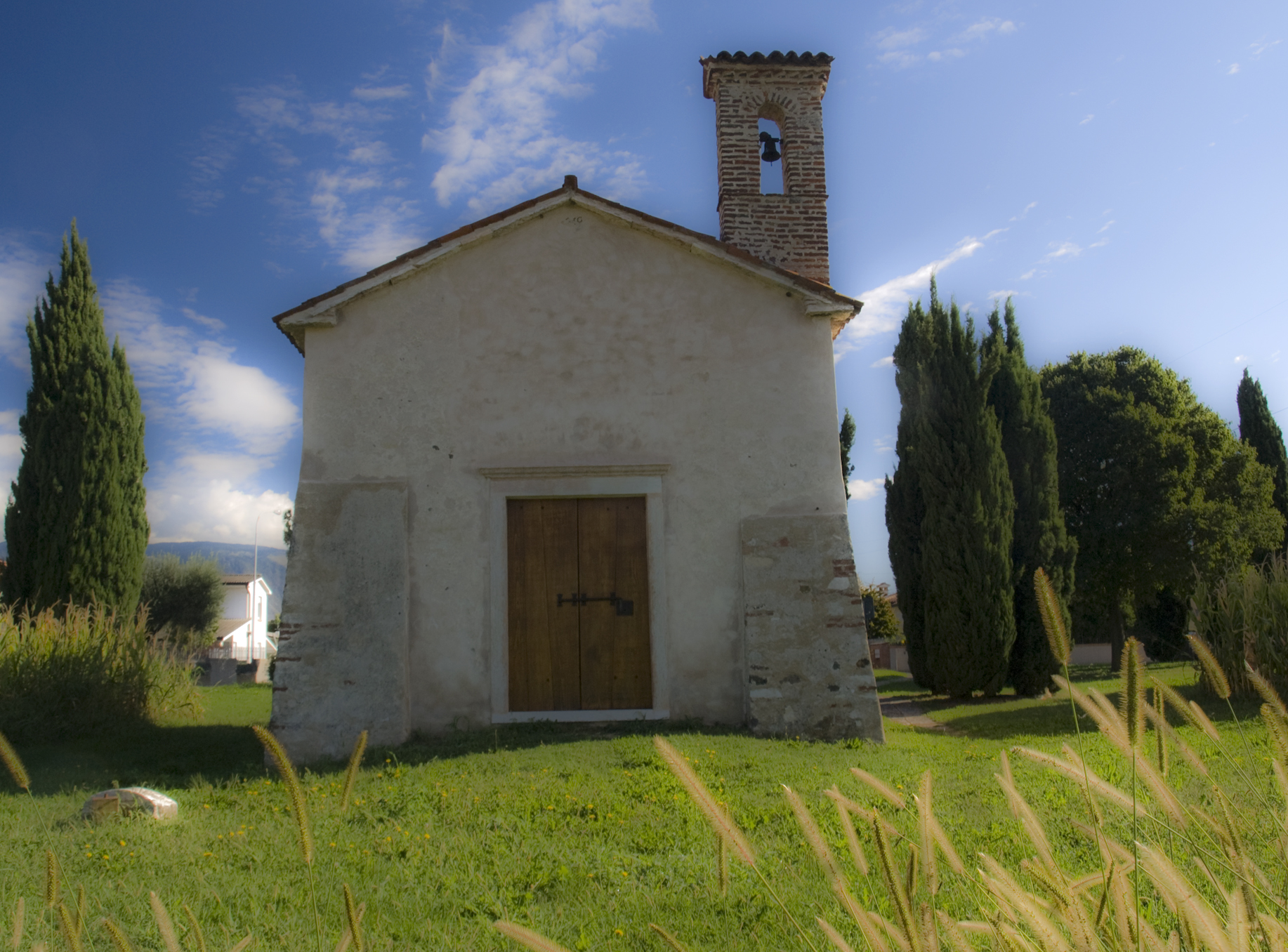 Chiesa di Santa Giustina This is a photo of a monument which is part of cultural heritage of Italy.